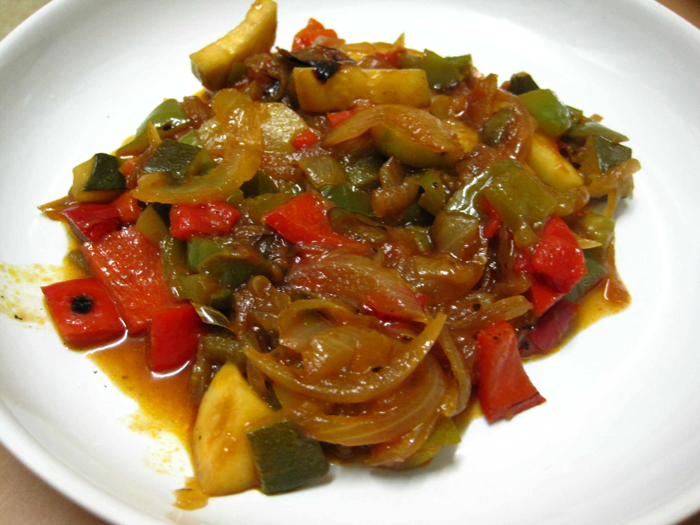 Sataraš: crni luk, paprika (zelena i crvena), paradajz, tikvica, maslinovo ulje. Ja kuvala, ja slikala.